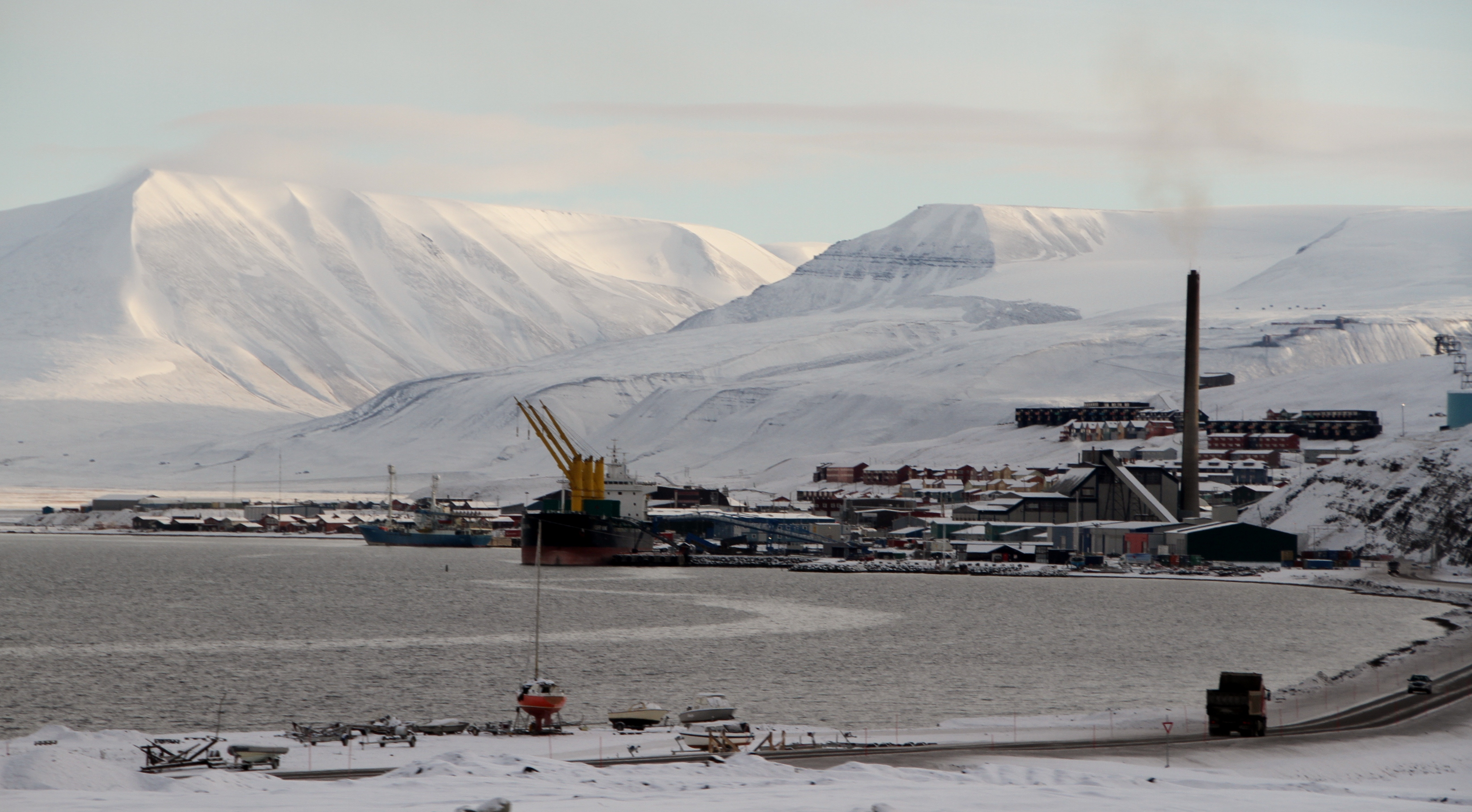 Sjöomraadet harbour area of Longyearbyen, in the Advent fjord. Spitsbergen, Norway.